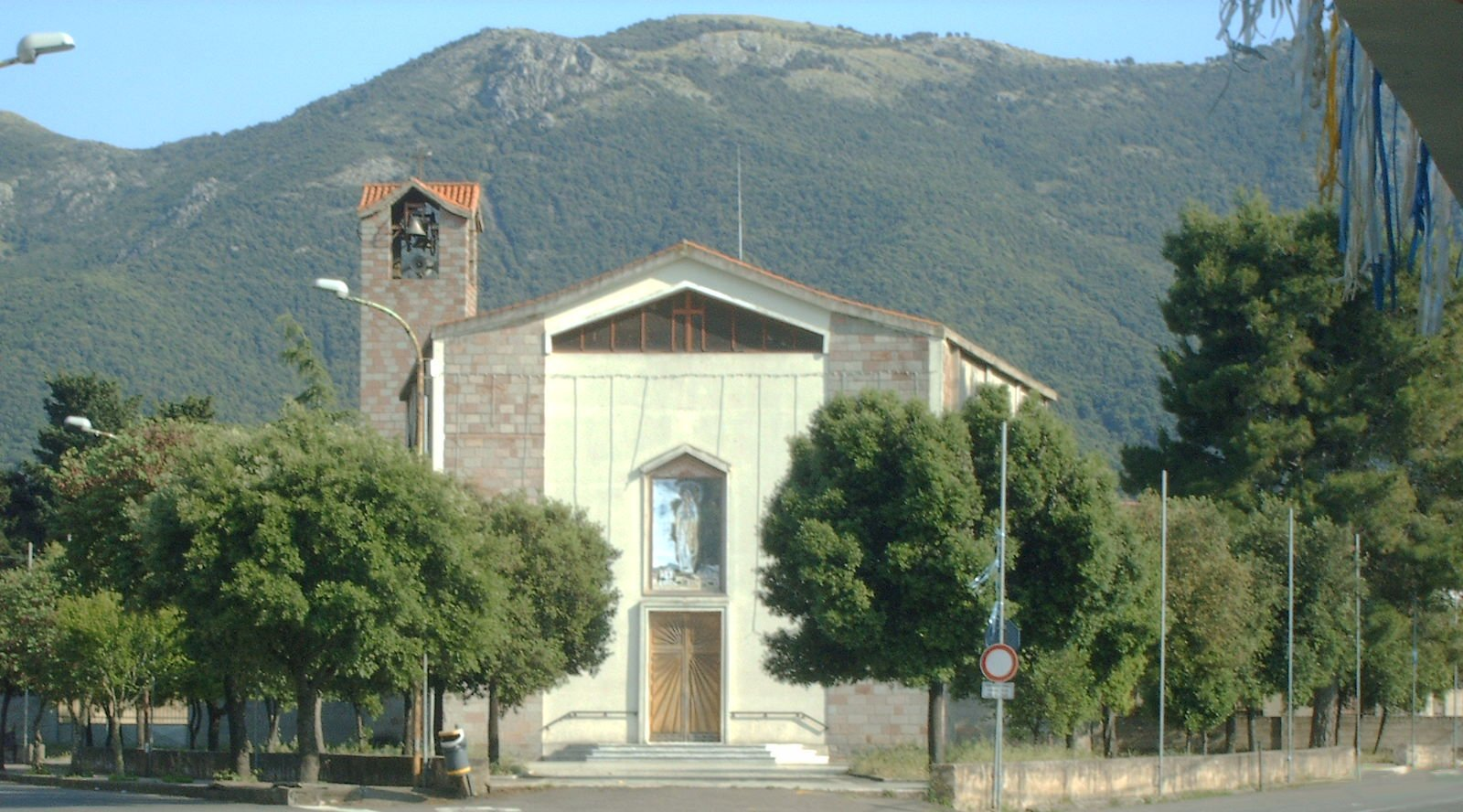 chiesa b.v.Lourdes-Gonnosfanadiga